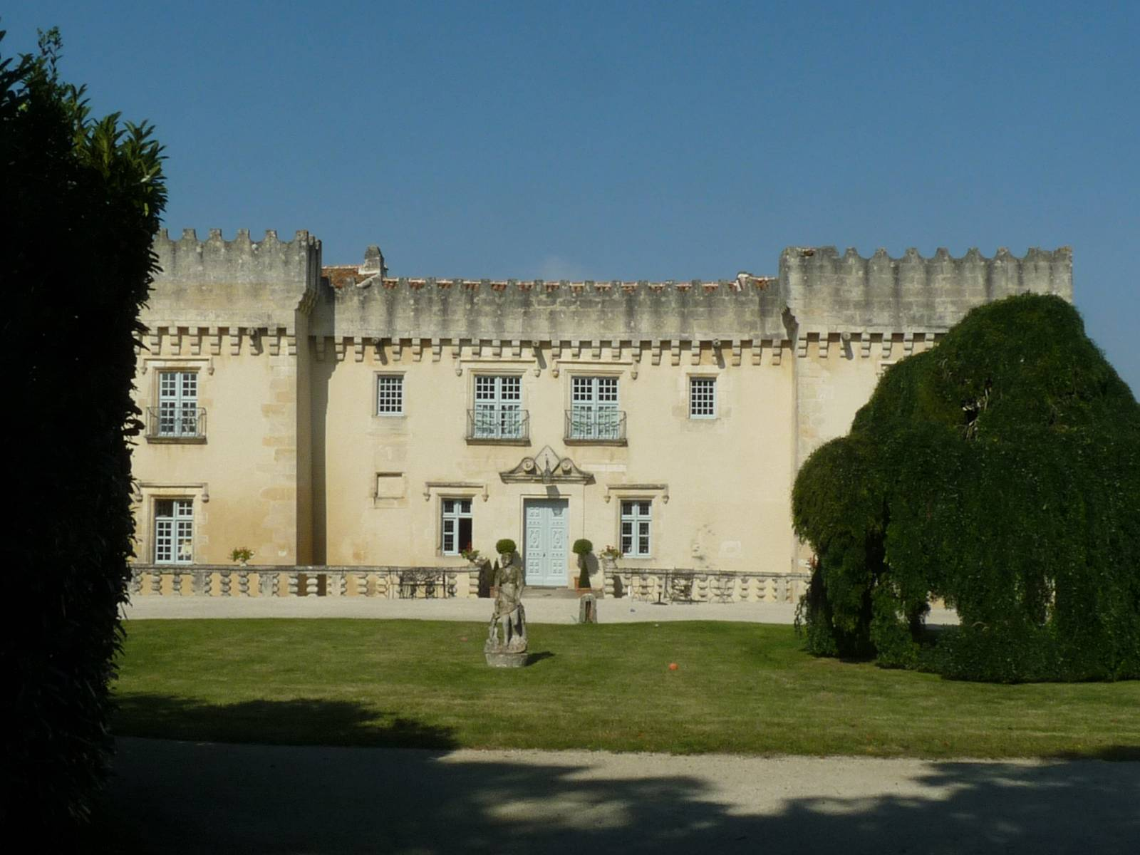 château de Fleurac, Nersac (16), France